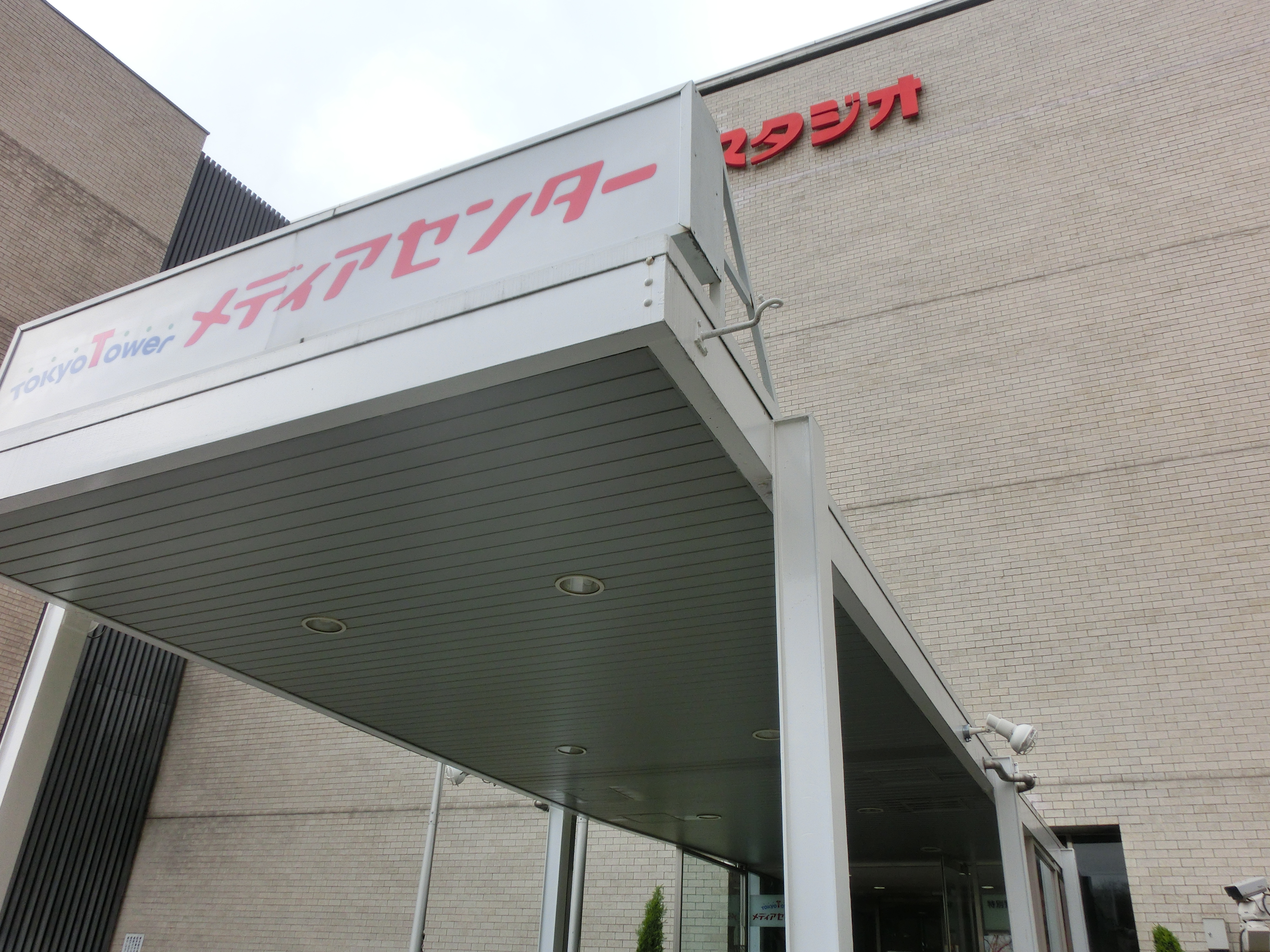 2016年3月13日 東京タワースタジオ